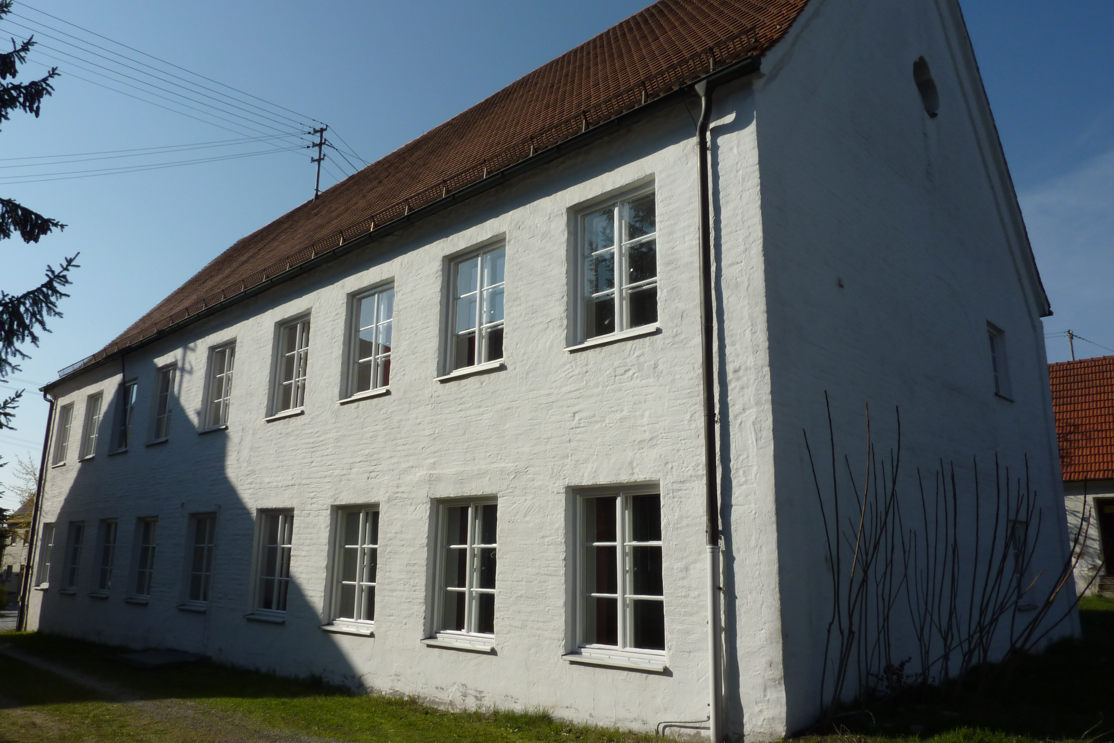 Synagoge in Buttenwiesen, Südseite